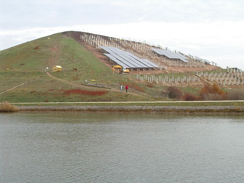 Atzenhof (bei Fürth), Ehem. Müllberg, jetzt Erholungsgebiet und Solaranlage, über den Kanal von SW (16. Nov. 2003), groß im Vordergrund der MD-Kanal. Fotograph: keichwa